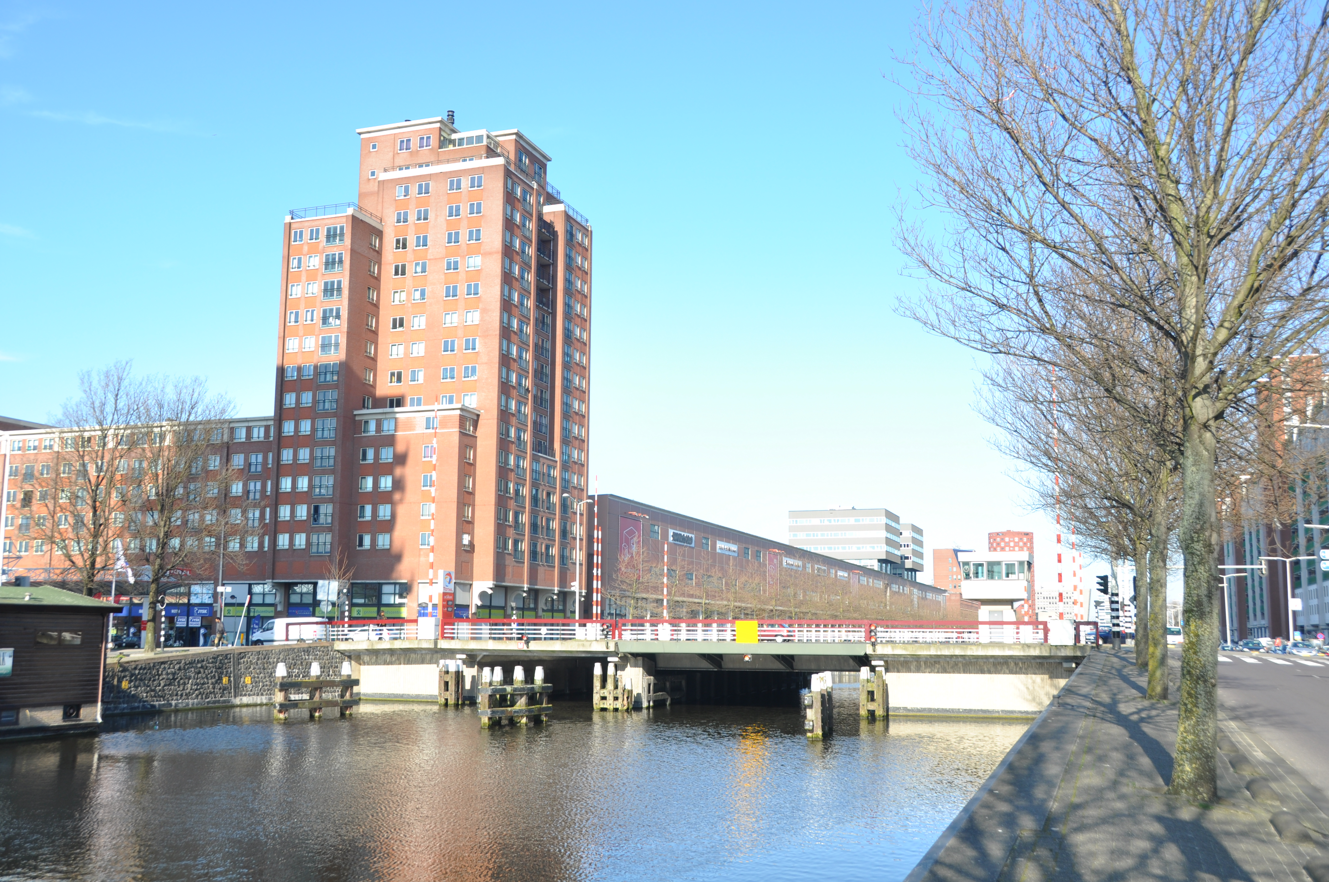 De Calandbrug in Den Haag.